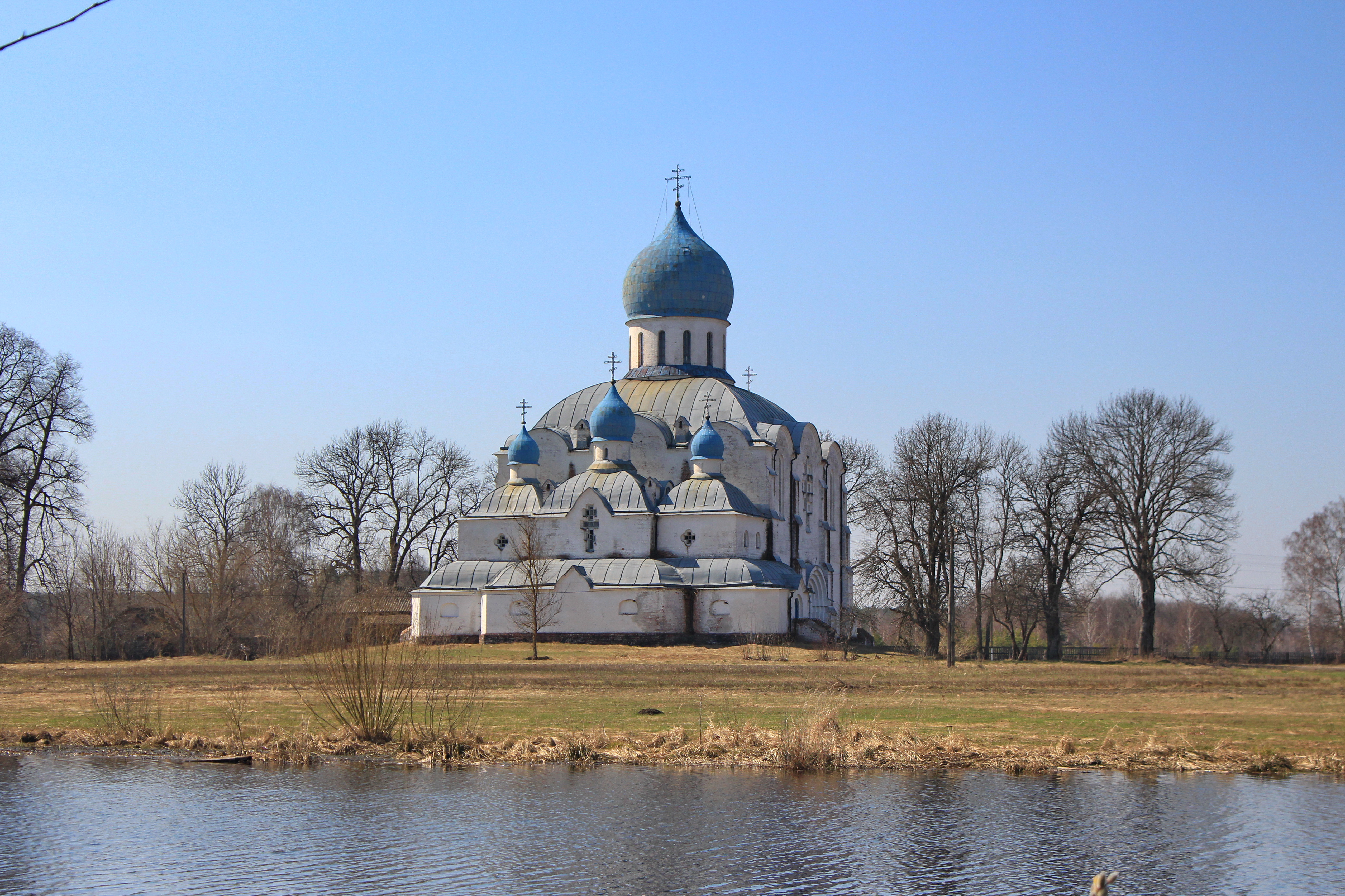 Покровська церква (мур.), Жукля